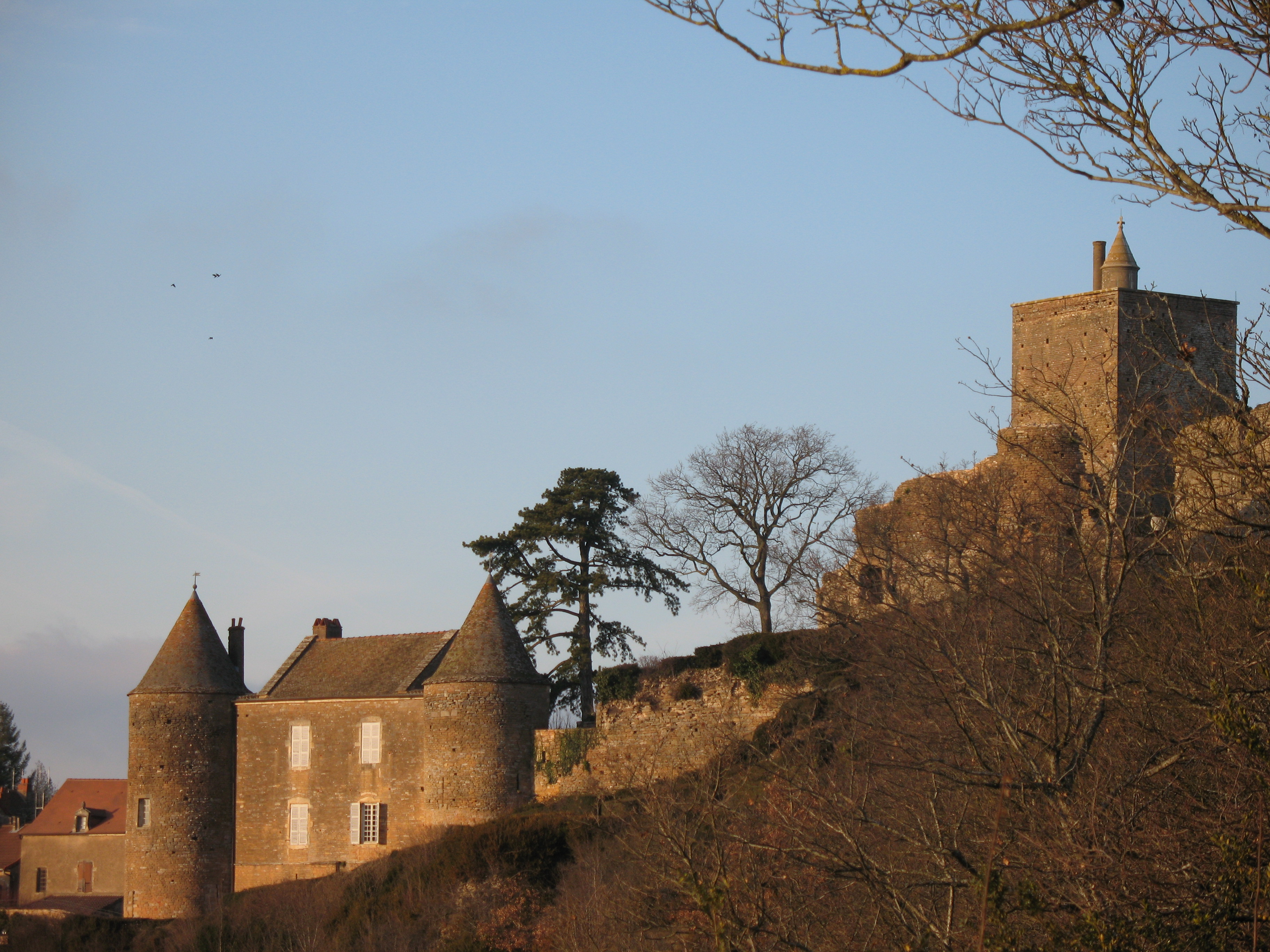 château de Brancion (Saône-et-Loire)